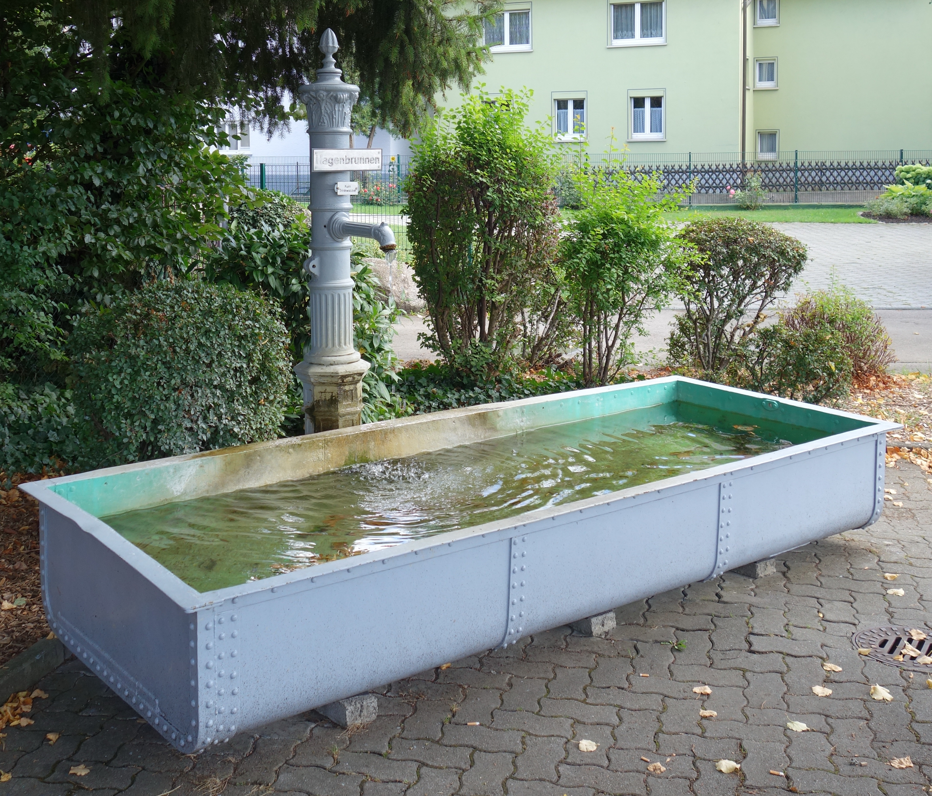 Der Frittlinger Hagenbrunnen, Denkinger Straße